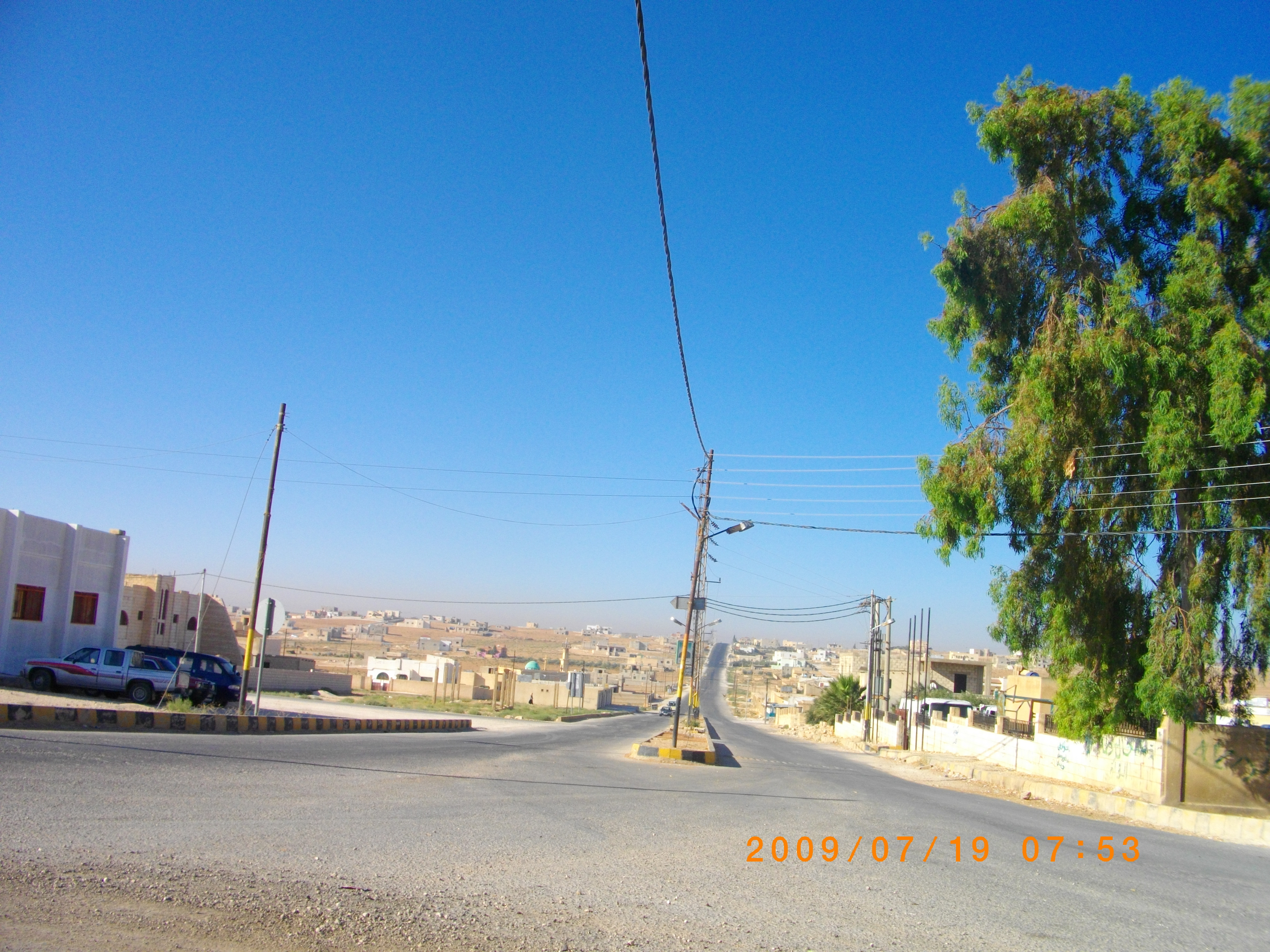 Al-Mafraq, Jordan